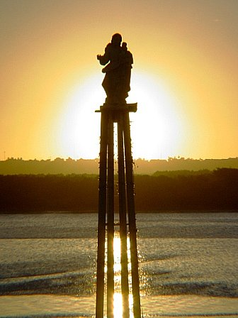 Pedra do Rosário, em Natal, RN, Brasil.